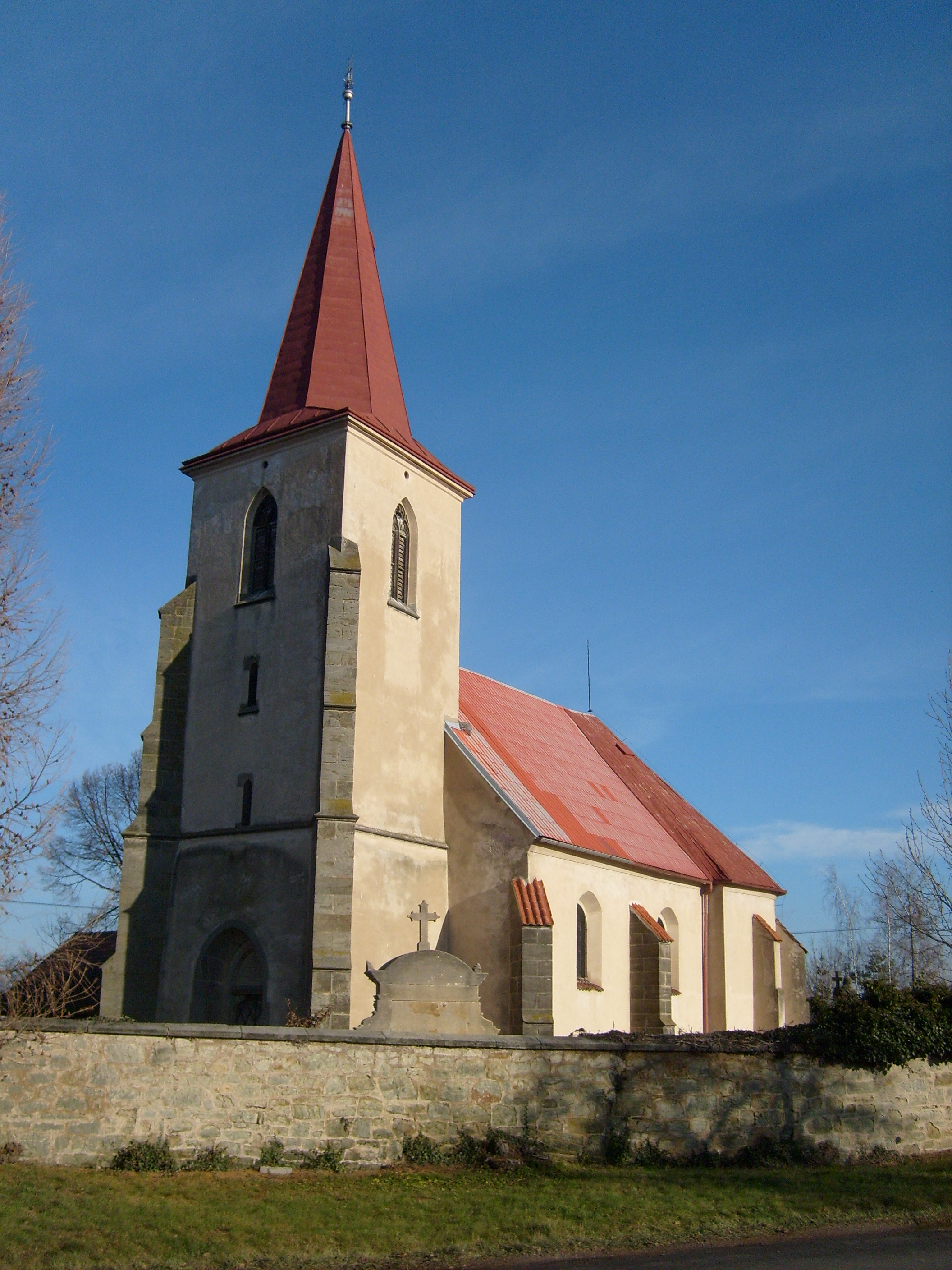 Kostel sv. Jiří, Tři Bubny, Orel, Pardubice Region, Czech Republic